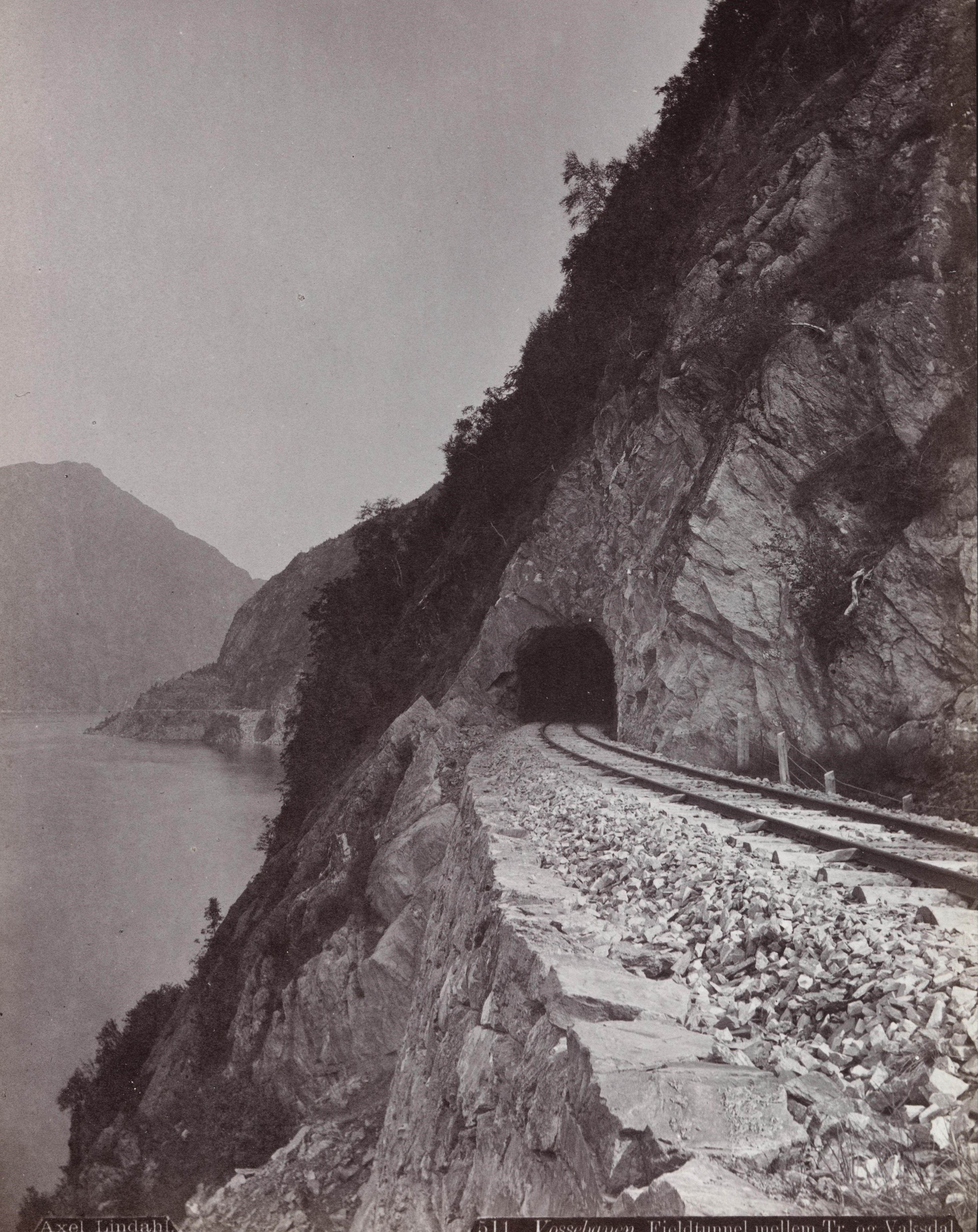 Bildet er hentet fra Nasjonalbibliotekets bildesamling. Anmerkninger til bildet var: Ekstern kommentar: "Dette er vestlig inngangen til tunnelen Hane II på gamle Vossebanen. Tunnelen var den nest lengste på den opprinnelige Vossebanen (1883) med sine 736 meter. Hele traseet lå i et utsatt området og tunnelen ble derfor, som endel av Bergensbanens partielle utbyggning, forlenget i vestlig retning, sannsynligvis i 20/30 årene. Bildet med tilvekstnr: NF.WL 00508 viser vestlig forsettelse av linjen med tunnelen Hane I i bildet." Hordaland